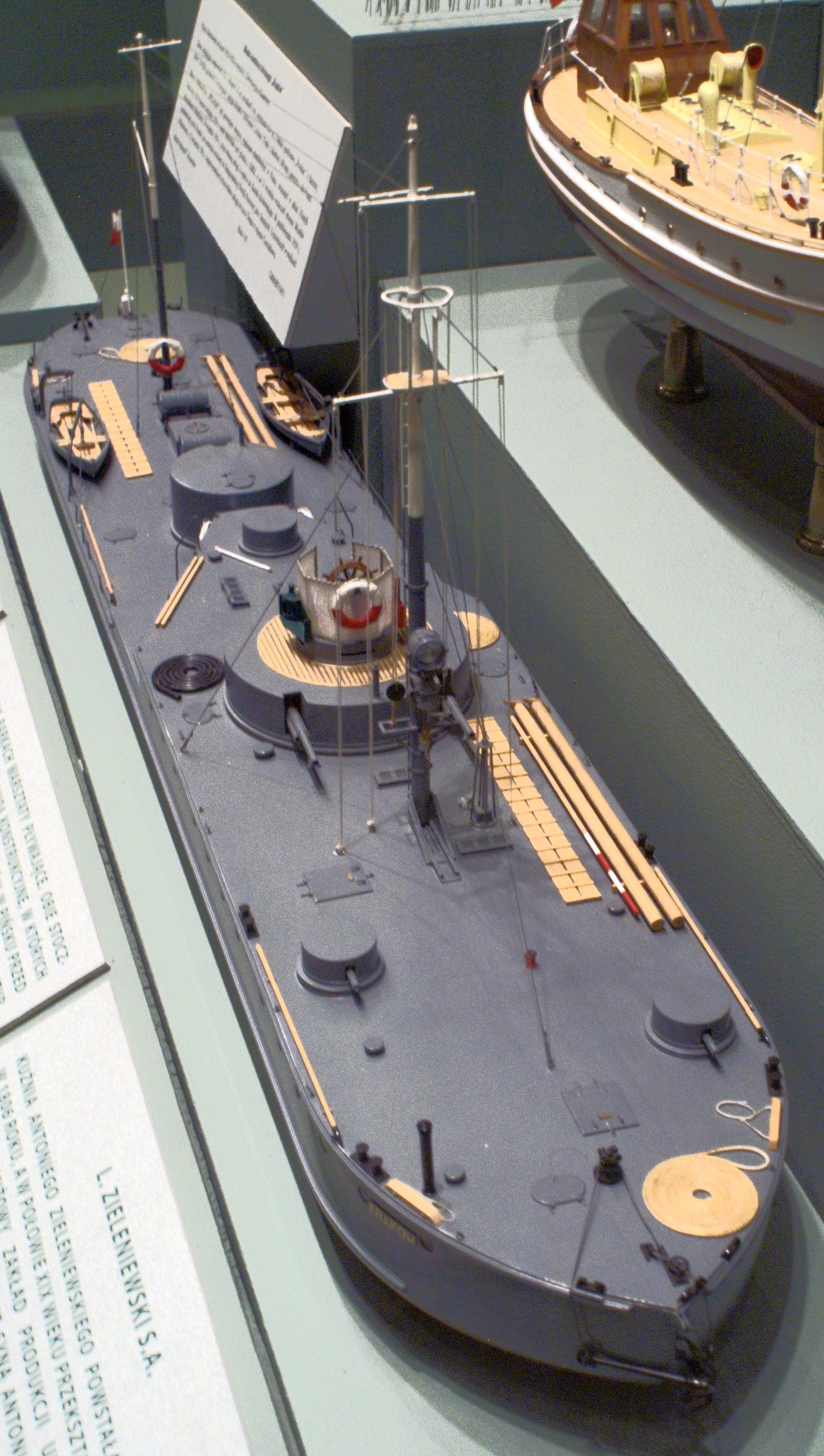 Model monitora rzecznego ORP Kraków (1926) w skali 1:50, wykonany przez P. Komender